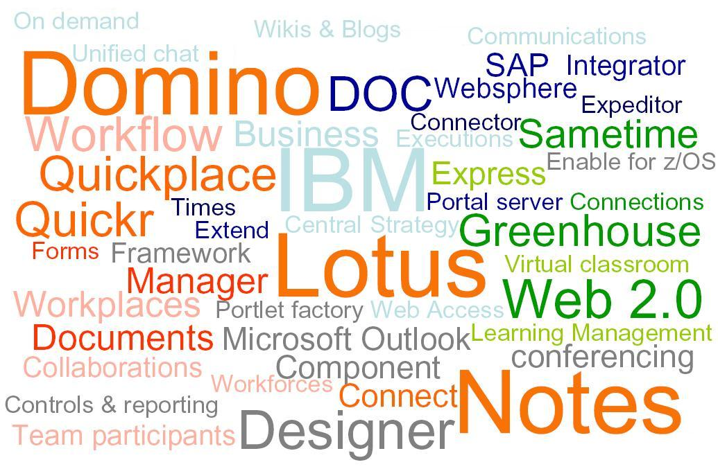 Lotus competences